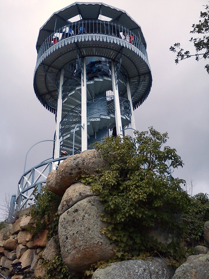 Atalaya de Eiffel situada en Las Navas del Marques (Avila)